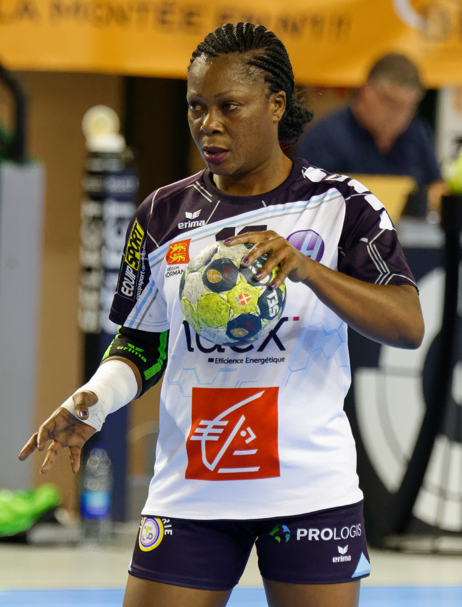 Rencontre entre Issy Paris Hand et Le Havre. A Boulogne-Billancourt, le 07 octobre 2017.